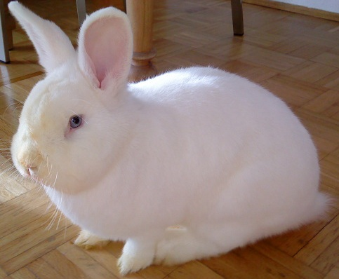 Weißer Wiener